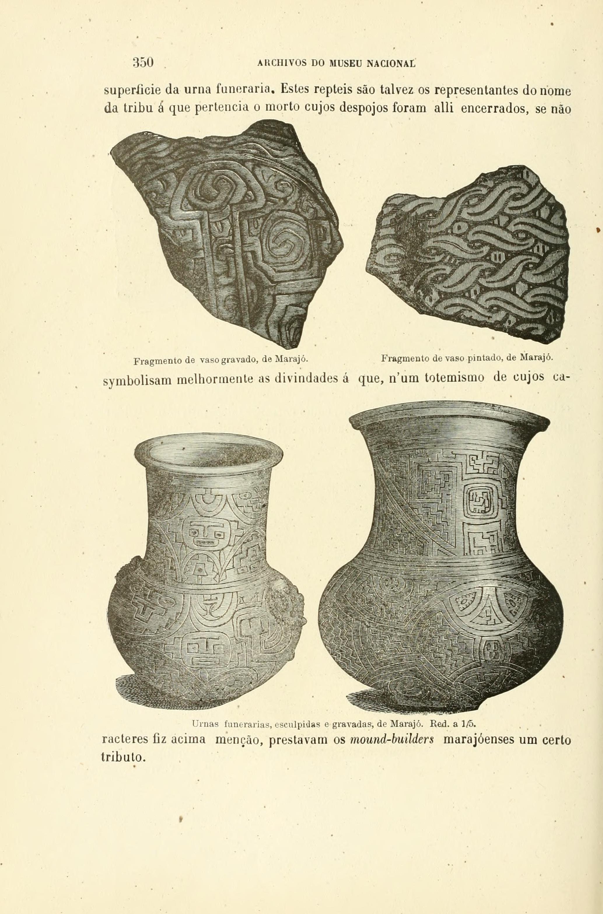 Archivos do Museu Nacional do Rio de Janeiro.